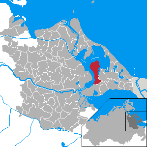 Rankwitz, Landkreis Ostvorpommern, Mecklenburg-Vorpommern